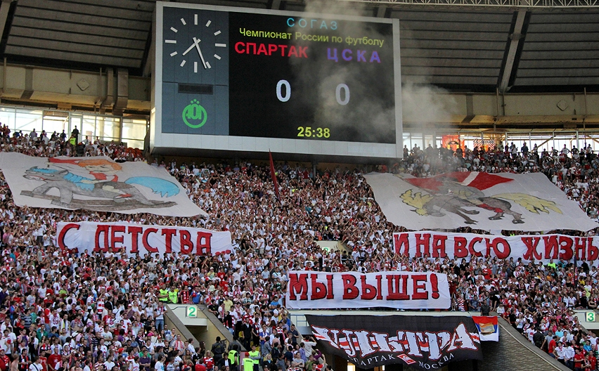 Перфоманс "С детства и на всю жизнь…Мы выше!" на матче с ЦСКА. 2011 год